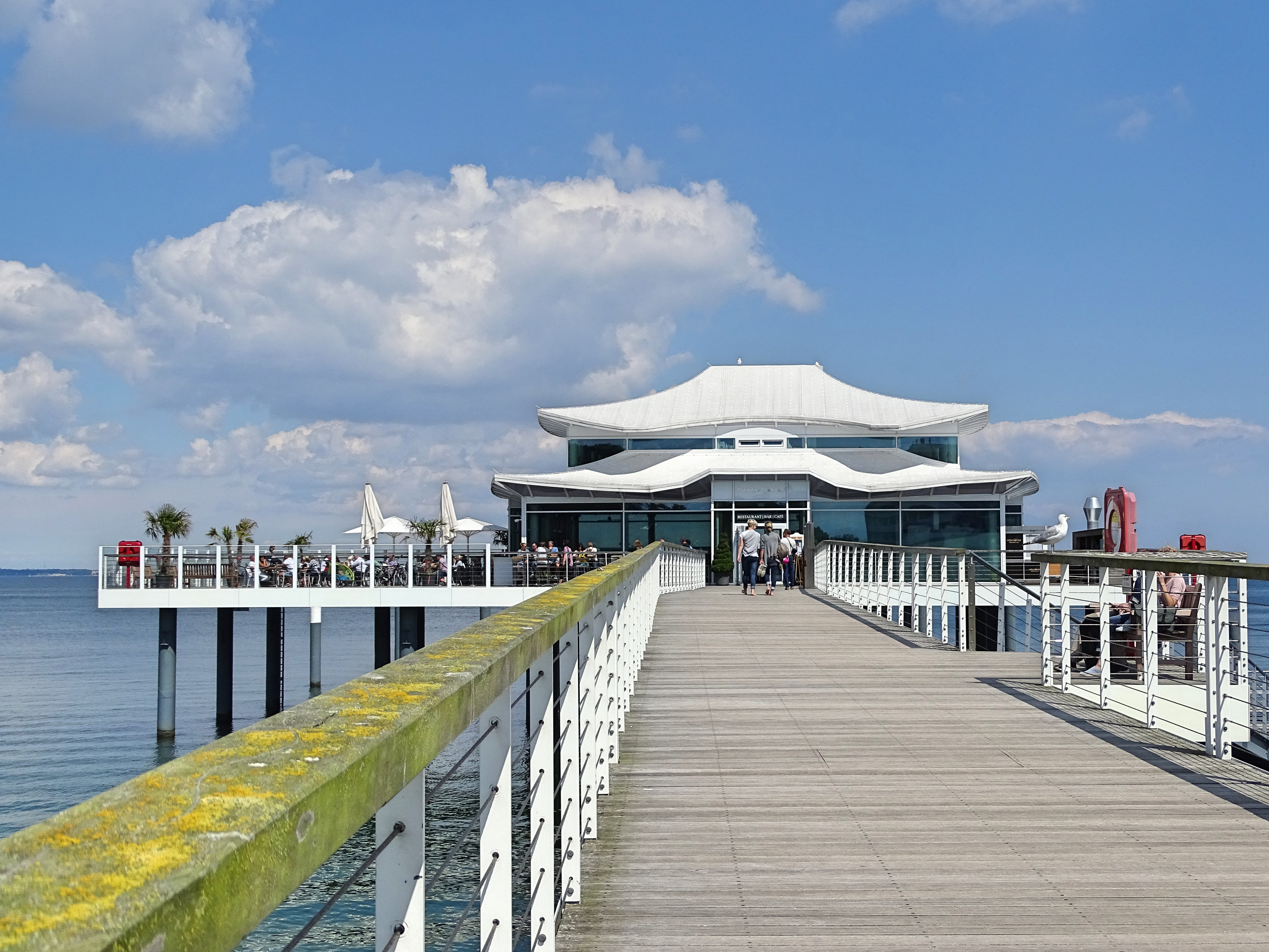 Strandallee 139A, 23669 Timmendorfer Strand, Germany